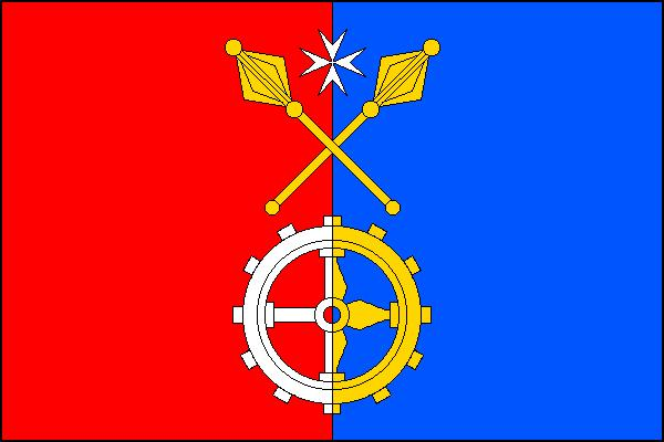 Vlajka obce Bolešiny